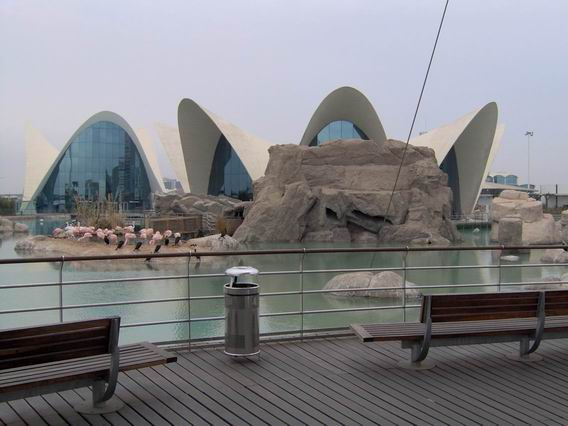 Restaurante del Parque Oceanográfico, Valencia, Spain.